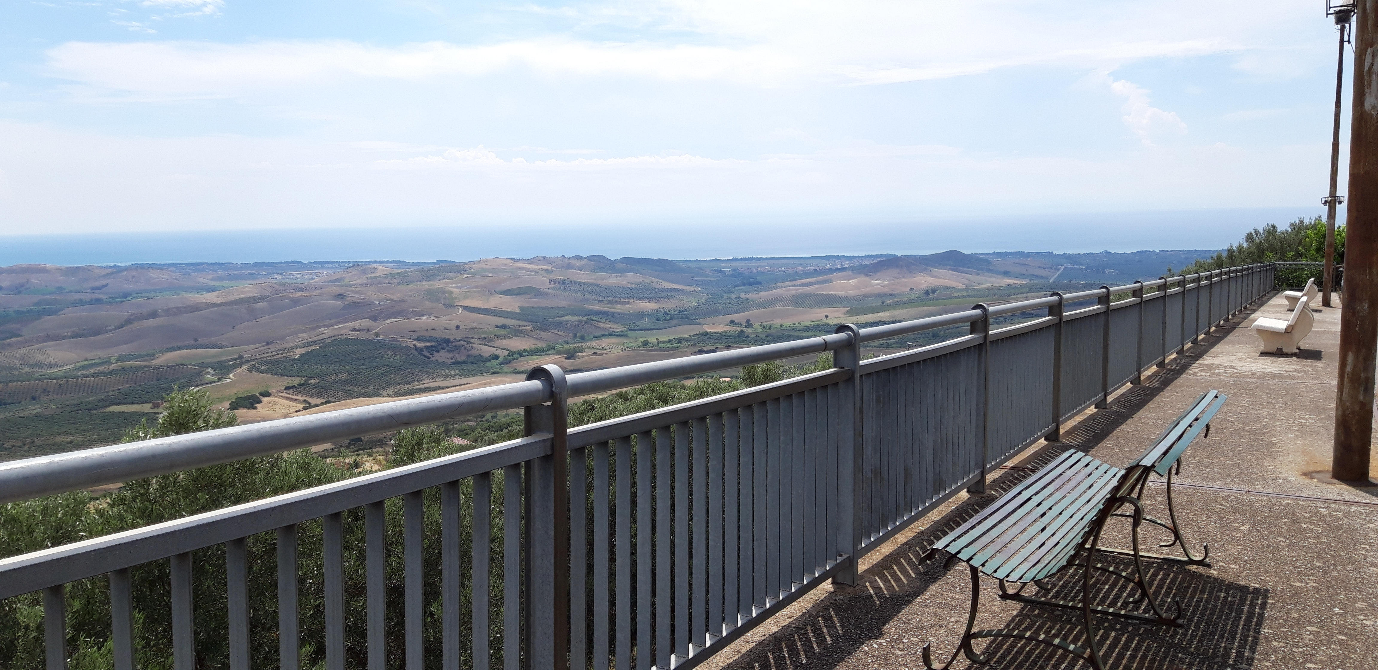 visione panoramica da Cropani.